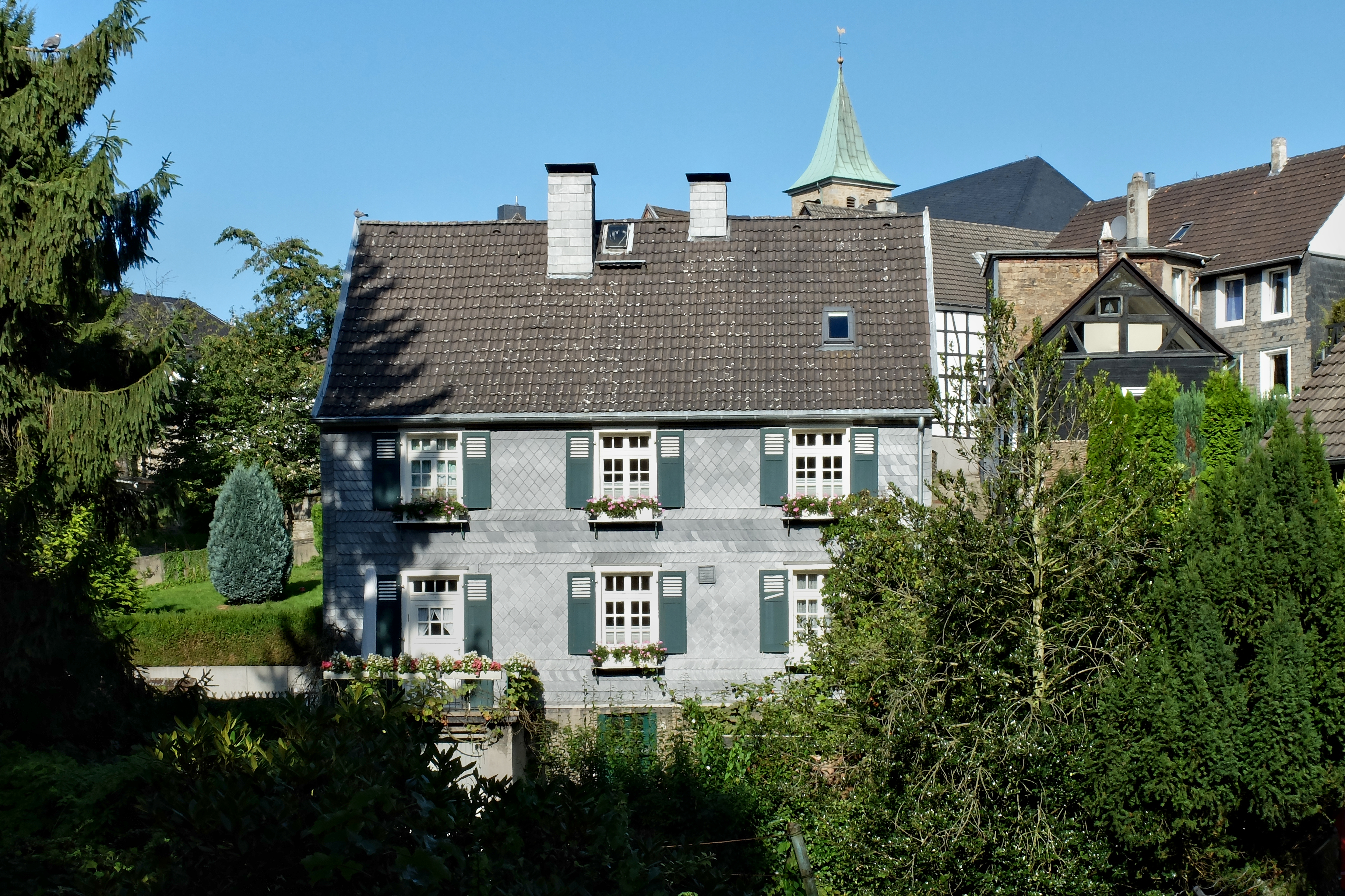 Denkmalnummer A-186 (Hattingen-Blankenstein) Im Tünken 4 45527 Hattingen 51.406213, 7.228942